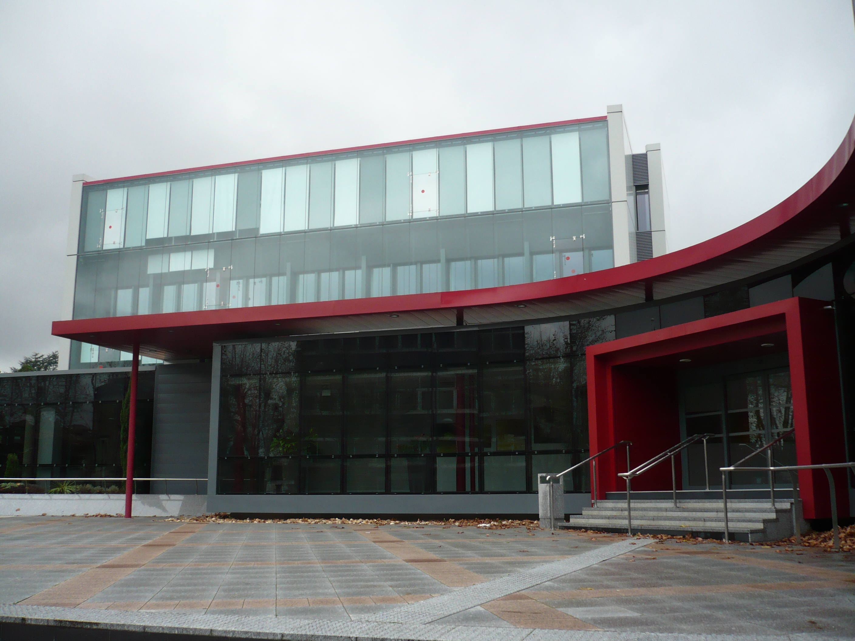 Castres